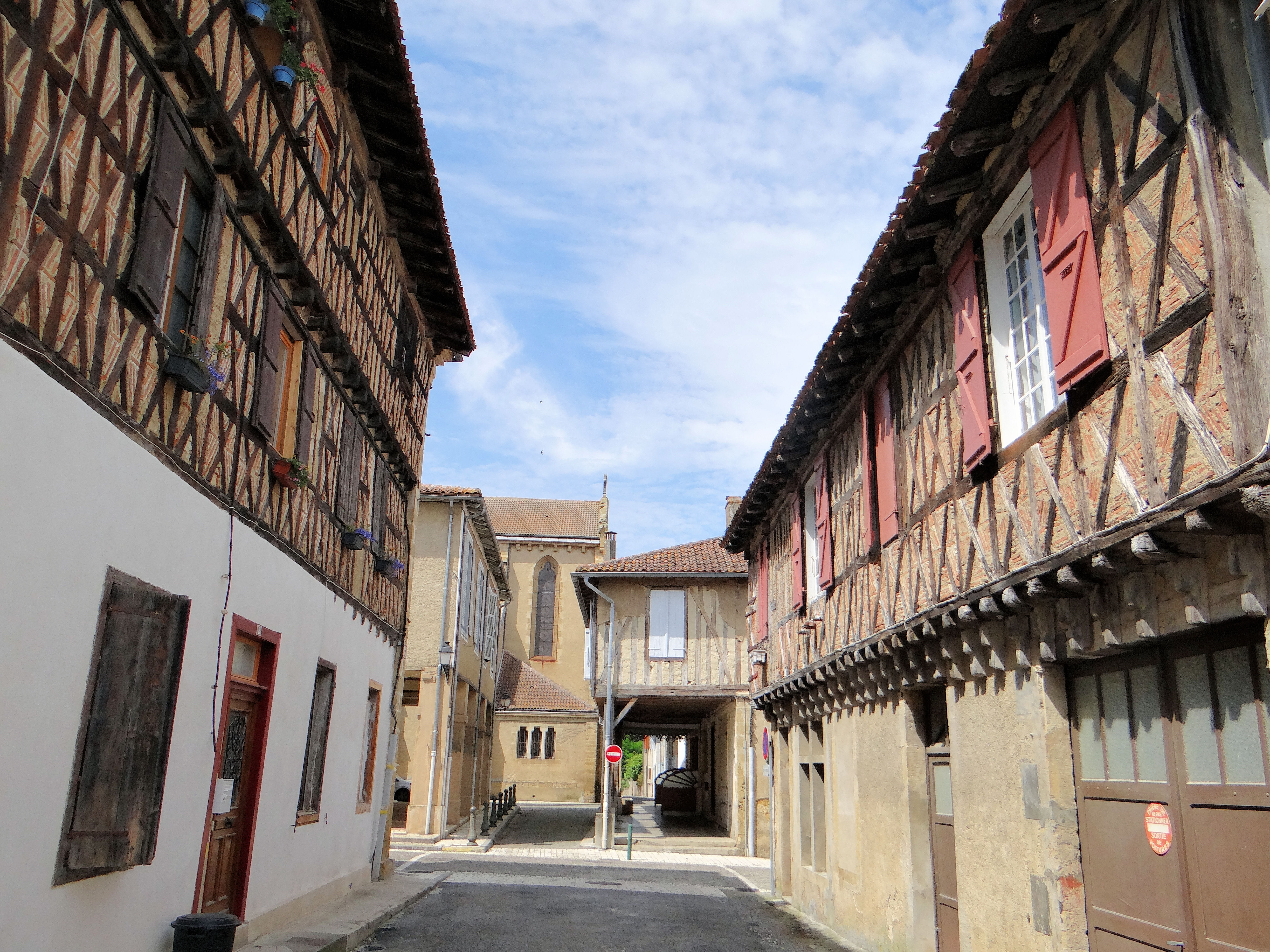 Masseube - Maison rue du commerce - Façades sur 'impasse du couvent